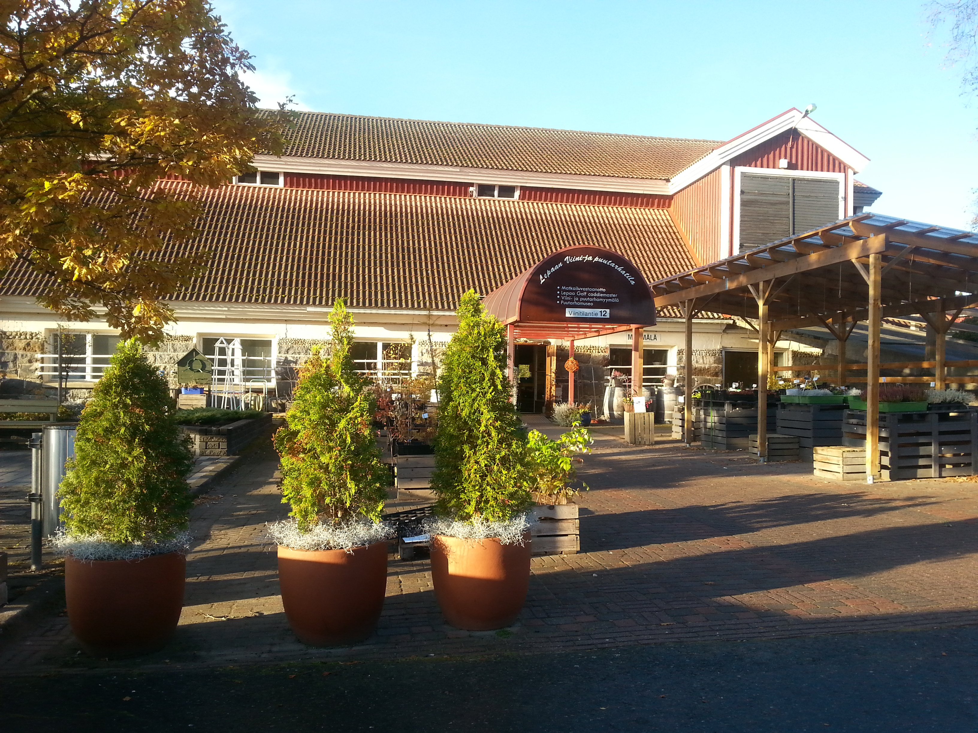 Hämeen ammattikorkeakouluun kytkeytyvä Lepaan viinitila Hattulassa